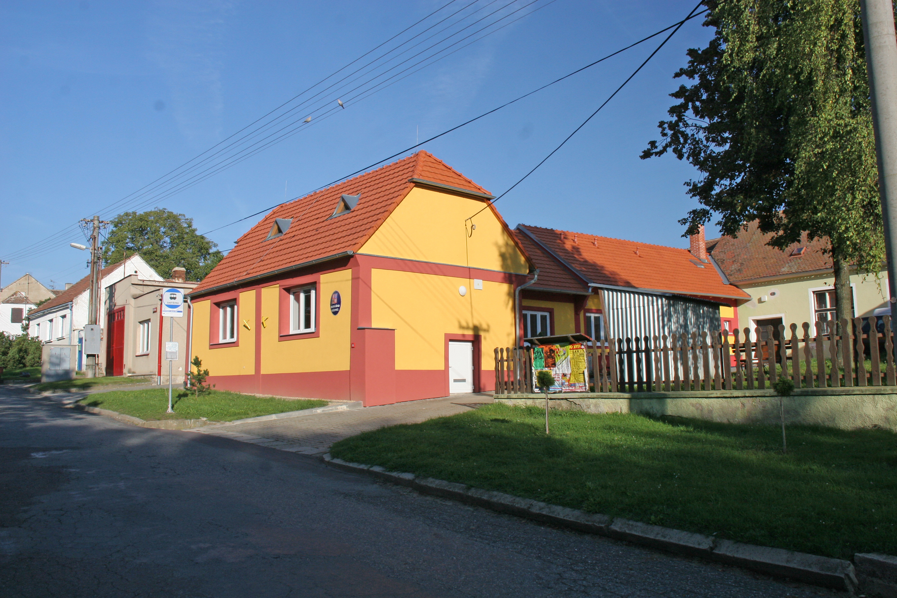 Milíčovice obecní úřad